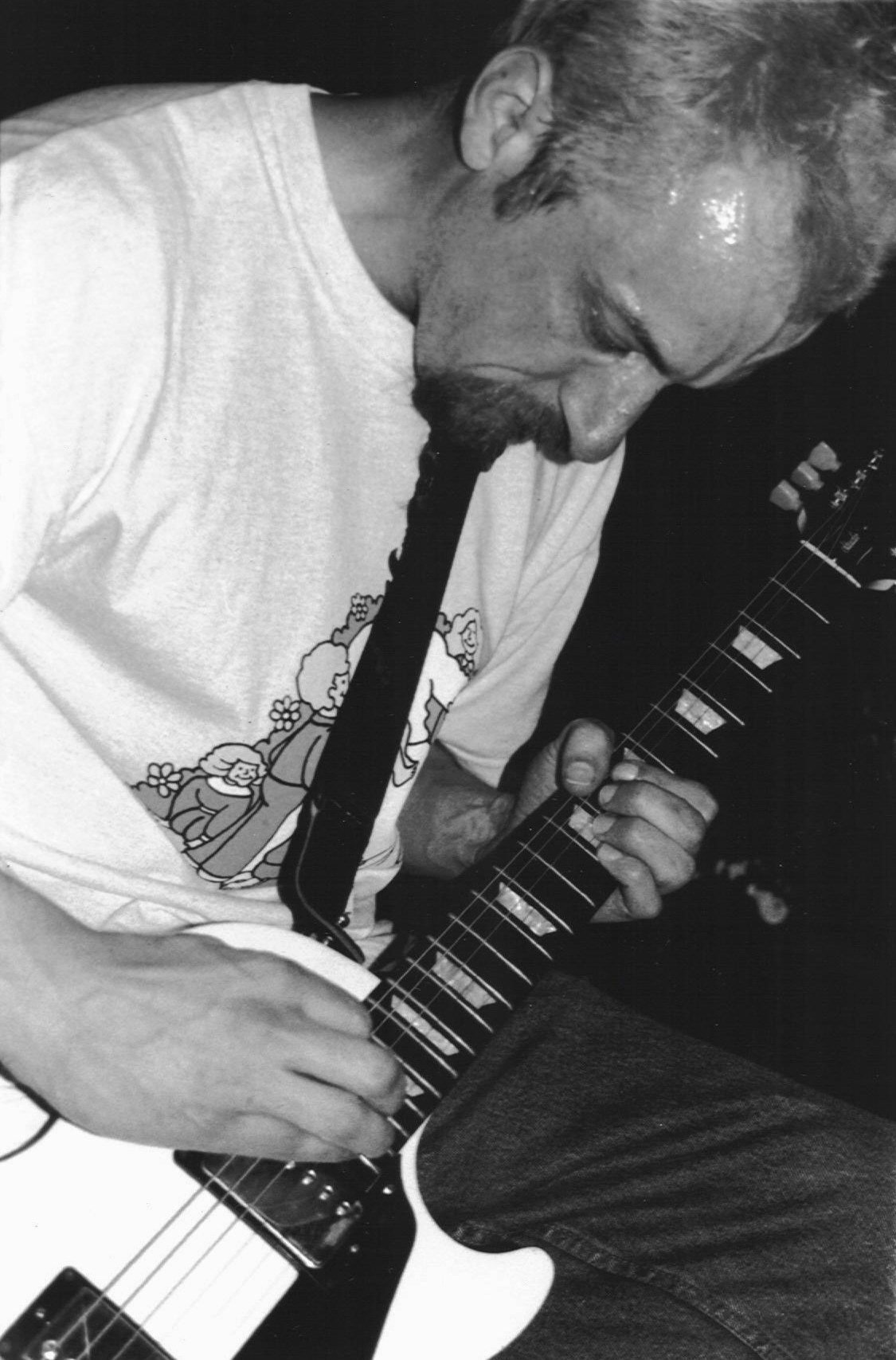 Joe Roberts von earthtone9 live auf der Abschiedstour 2002